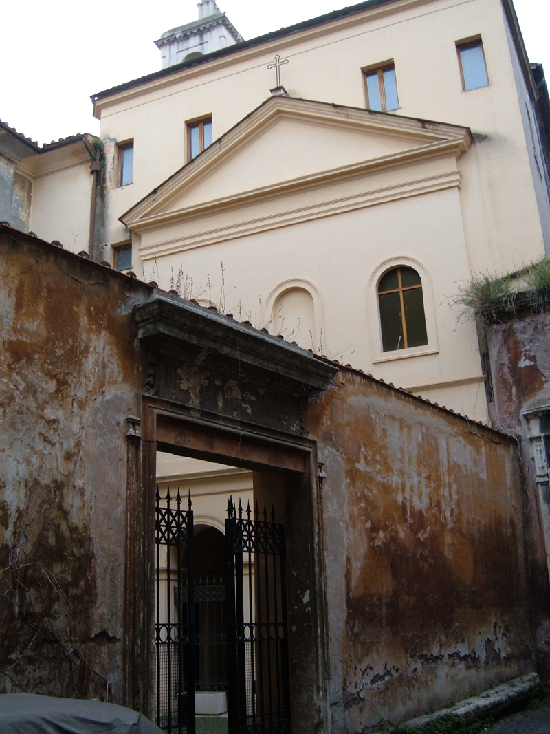 Chiesa di Sant'Ambrogio della Massima in Roma, rione Sant'Angelo. Foto personale.